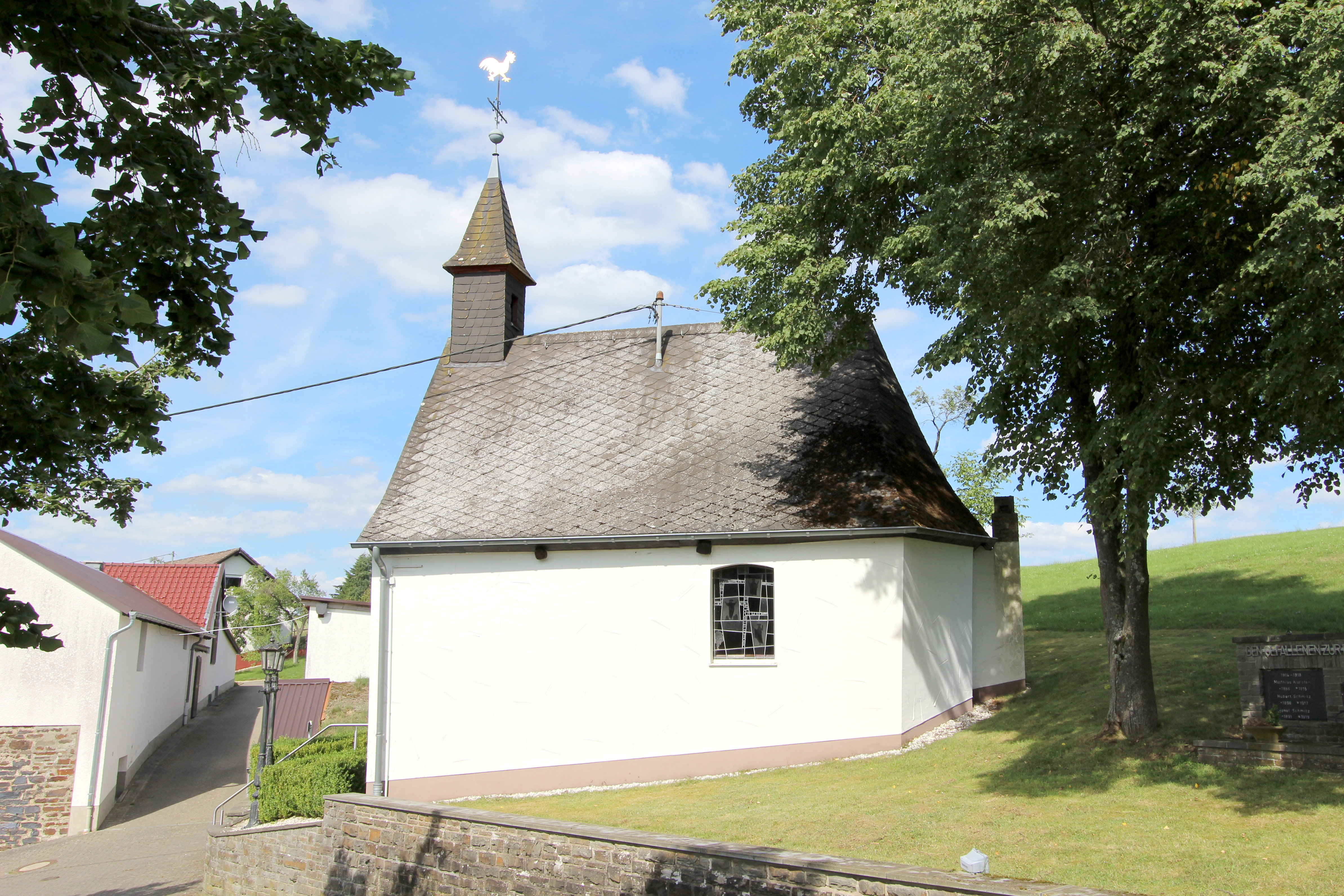 Sierscheid, Kapellenstraße. Saalbau, 17. oder 18. Jahrhundert. Aufnahme von 2017.